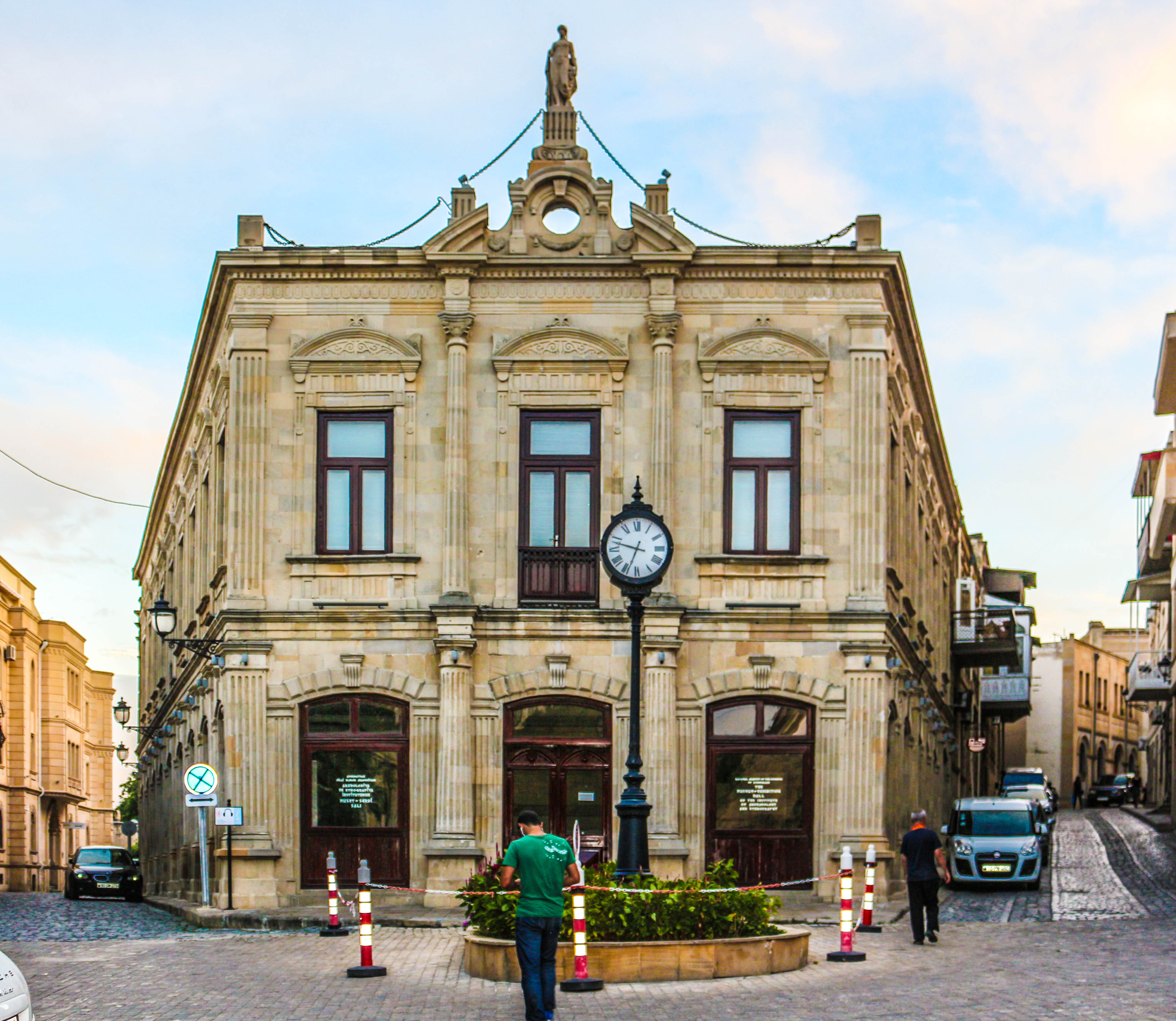 Yaşayış evi, Böyük Qala küç. 42